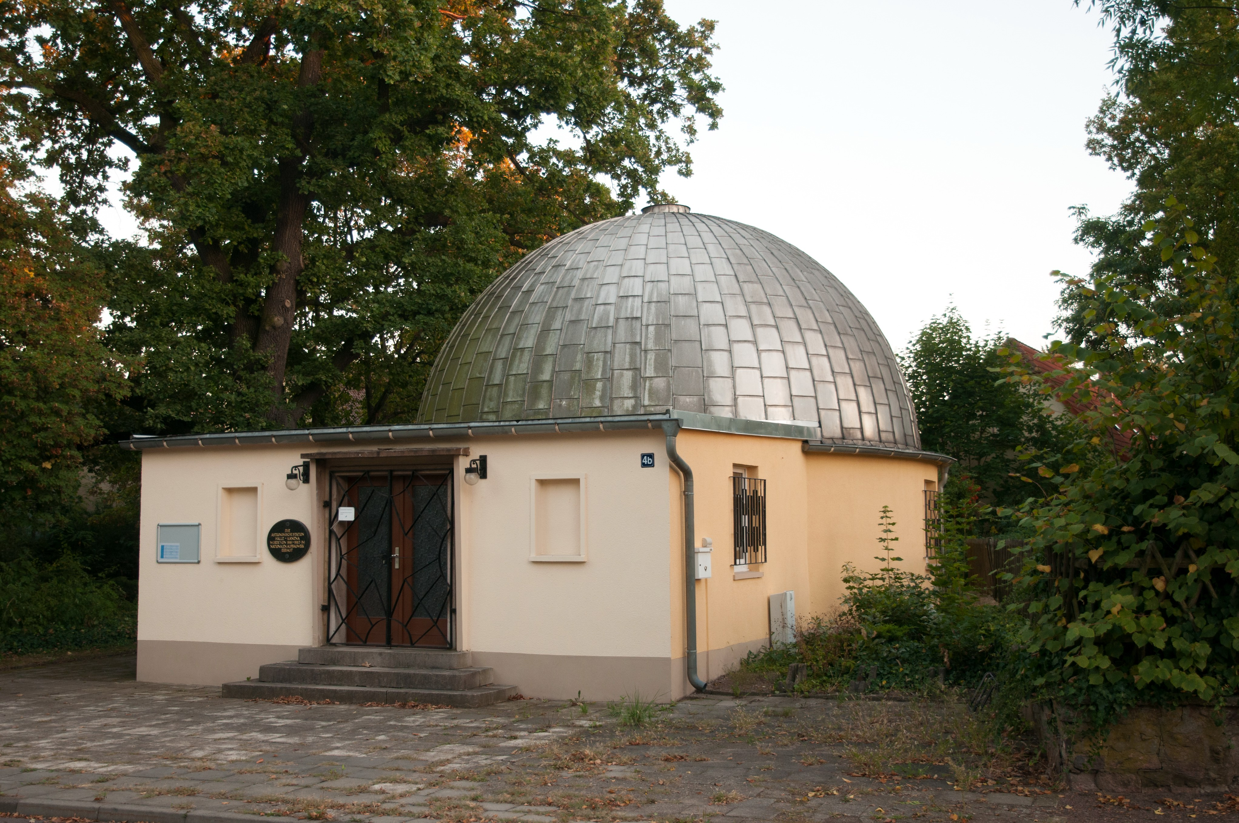 Planetarium, Halle-Kanena, Schkeuditzer Straße 4b